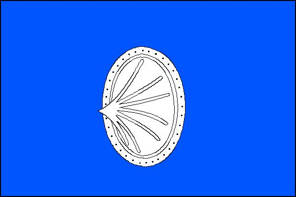 Vlajka obce Chanovice